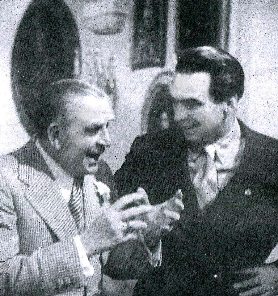 Quarta pagina (Manzari, 1943)- Armando Falconi e Manzari